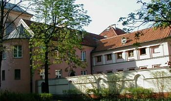 Warszawa - ul. Piwna 13 a, ob. Rycerska 2 - Zgromadzenie sióstr św. Elżbiety; kamienica, hospicjum - Szpital Św. Ducha, XV, XVI/XVII, 1950-53